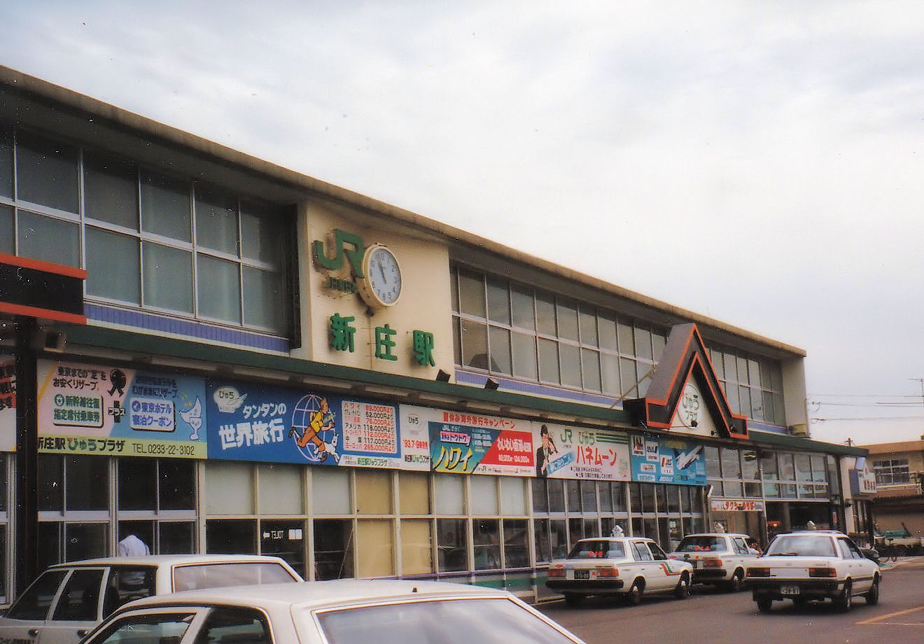 JR東日本新庄駅（山形新幹線延伸前）